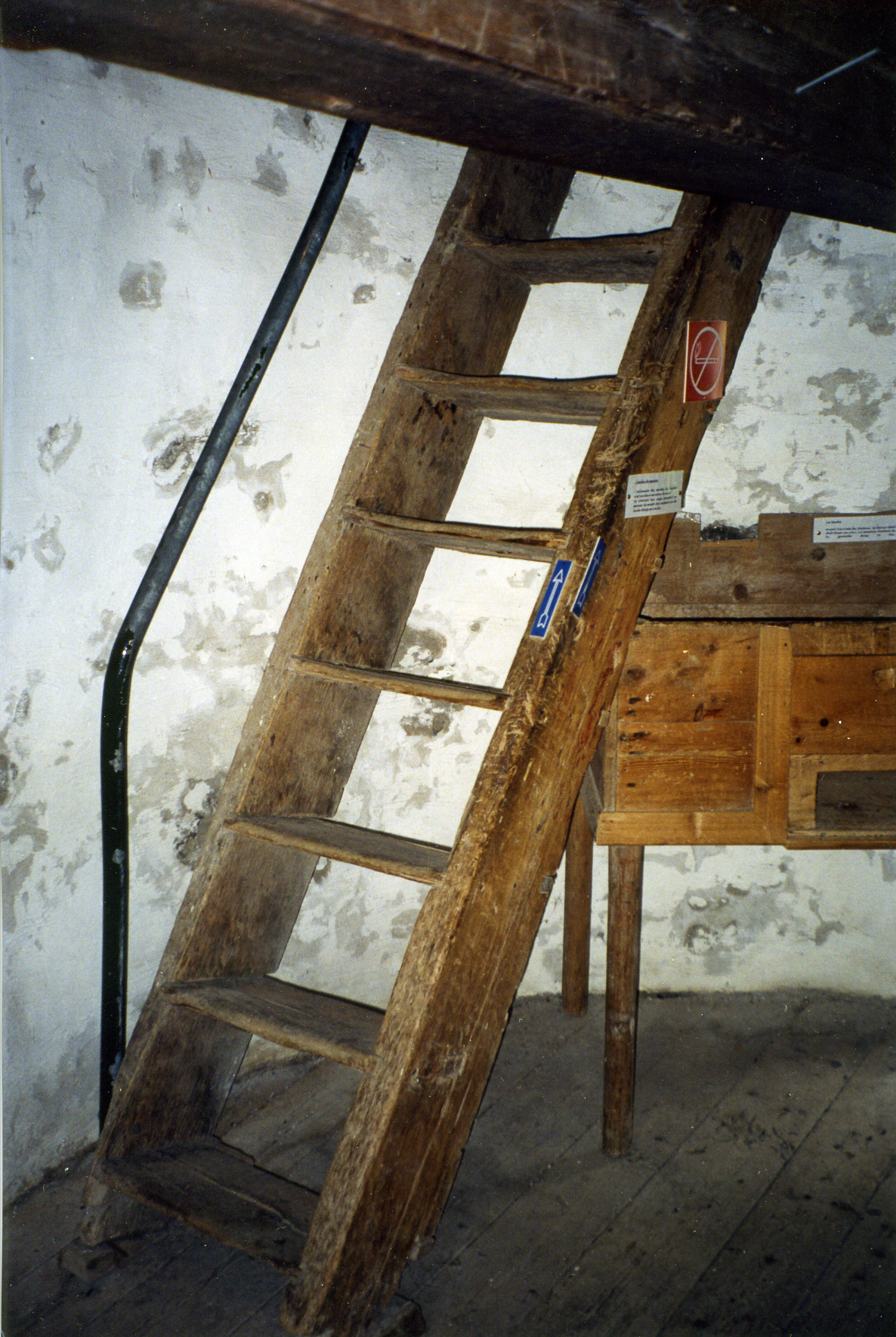 Escalier ou échelle de meunier, au Moulin à vent Desgagné de l'Isle-aux-Coudres (Charlevoix, Québec). Moulin à farine.